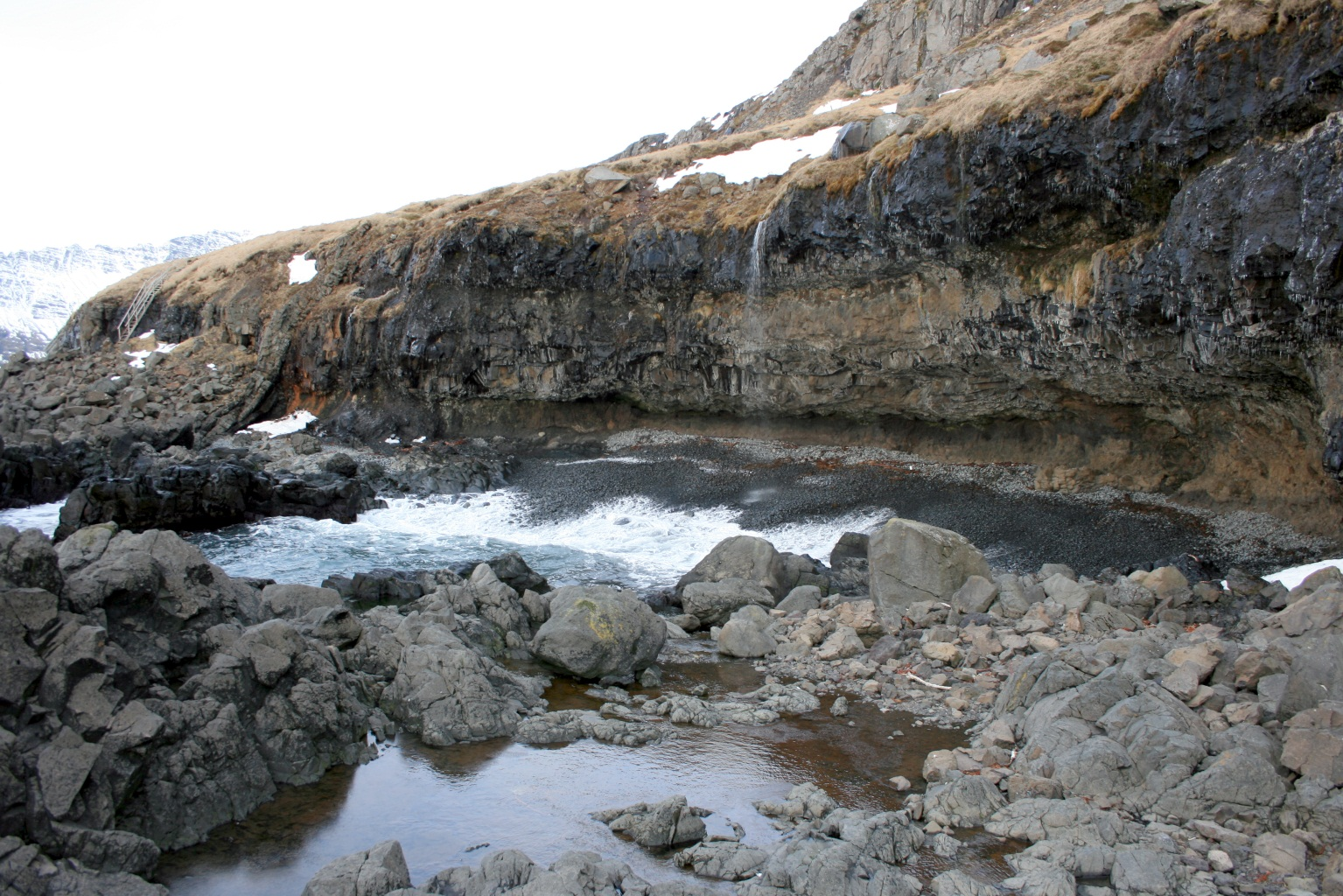 Páskahellir utan við Neskaupstað